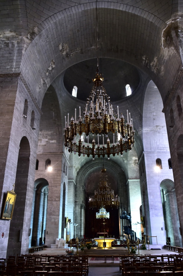 Périgueux - Cathédrale St-Front, Innenansicht